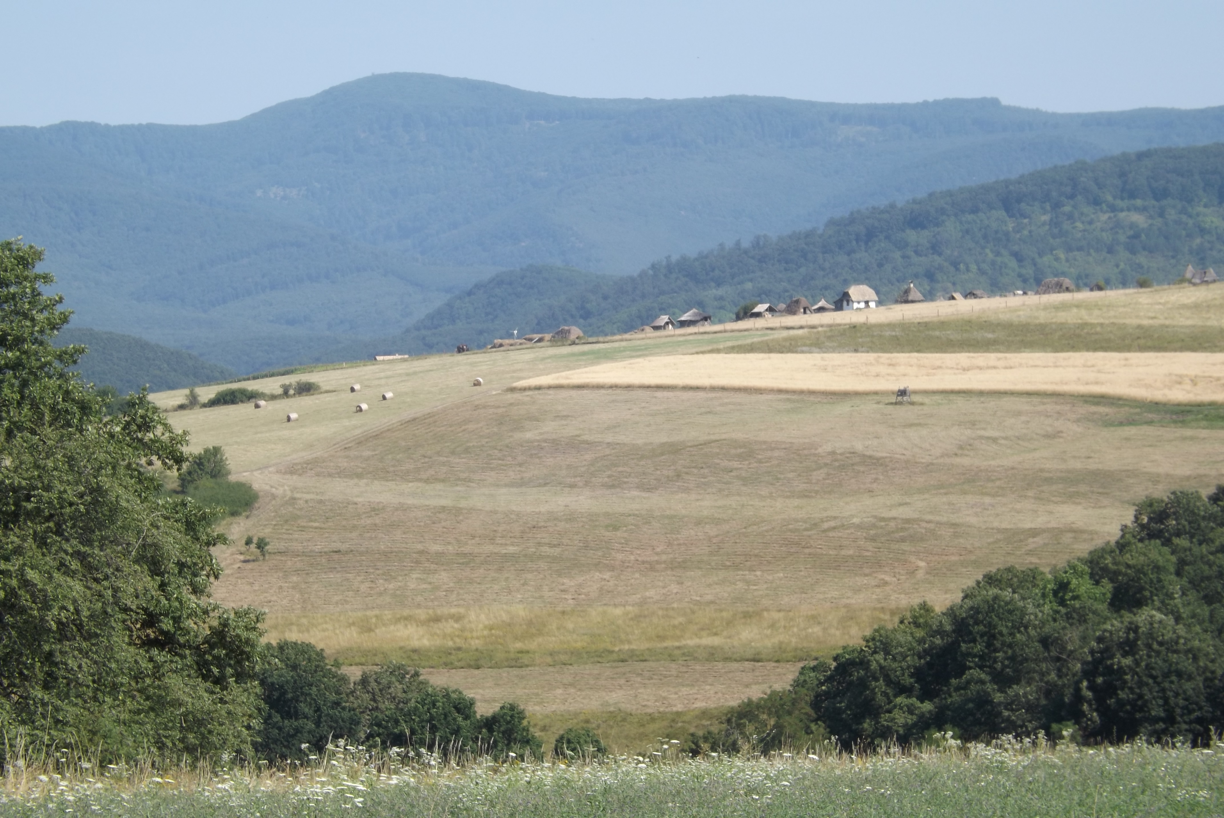 Kismaros, Börzsönyliget, kilátás Szokolya felé a távolban a Börzsöny vonulatai, előtérben a szokolyai Kacár-tanya épületei